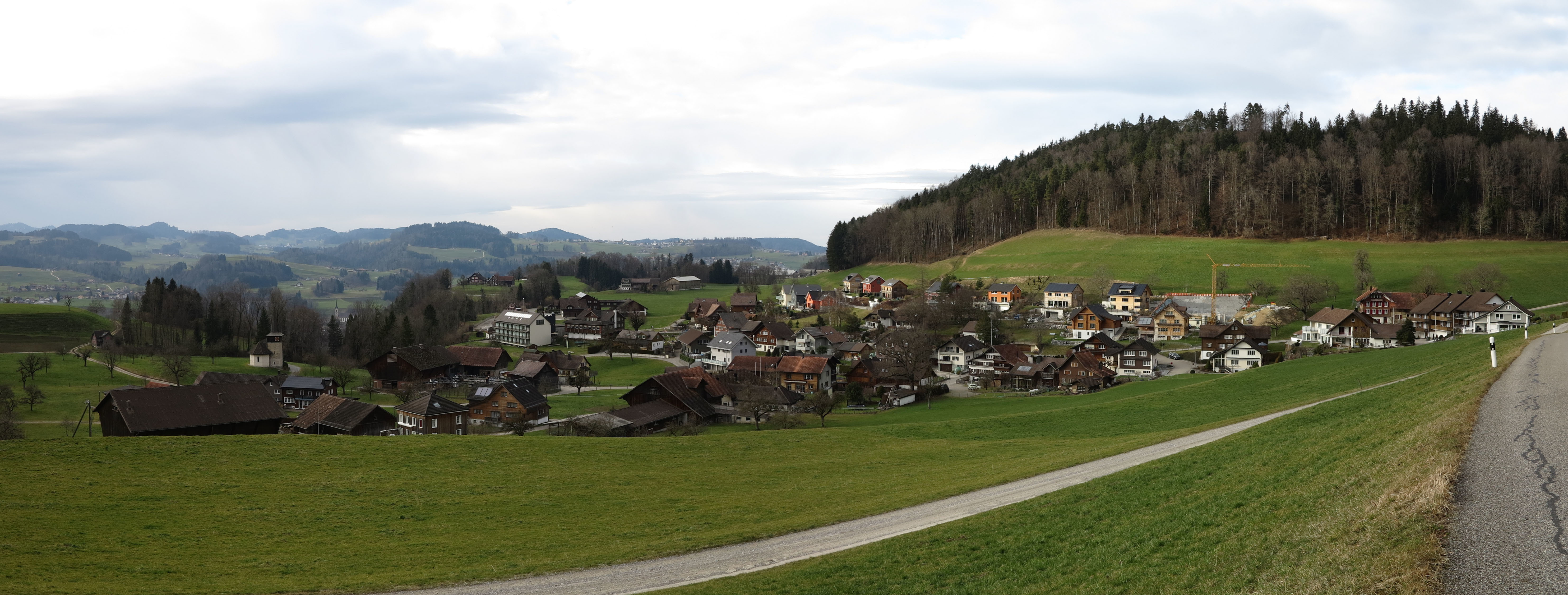 Tufertschwil aus Richtung Südwesten